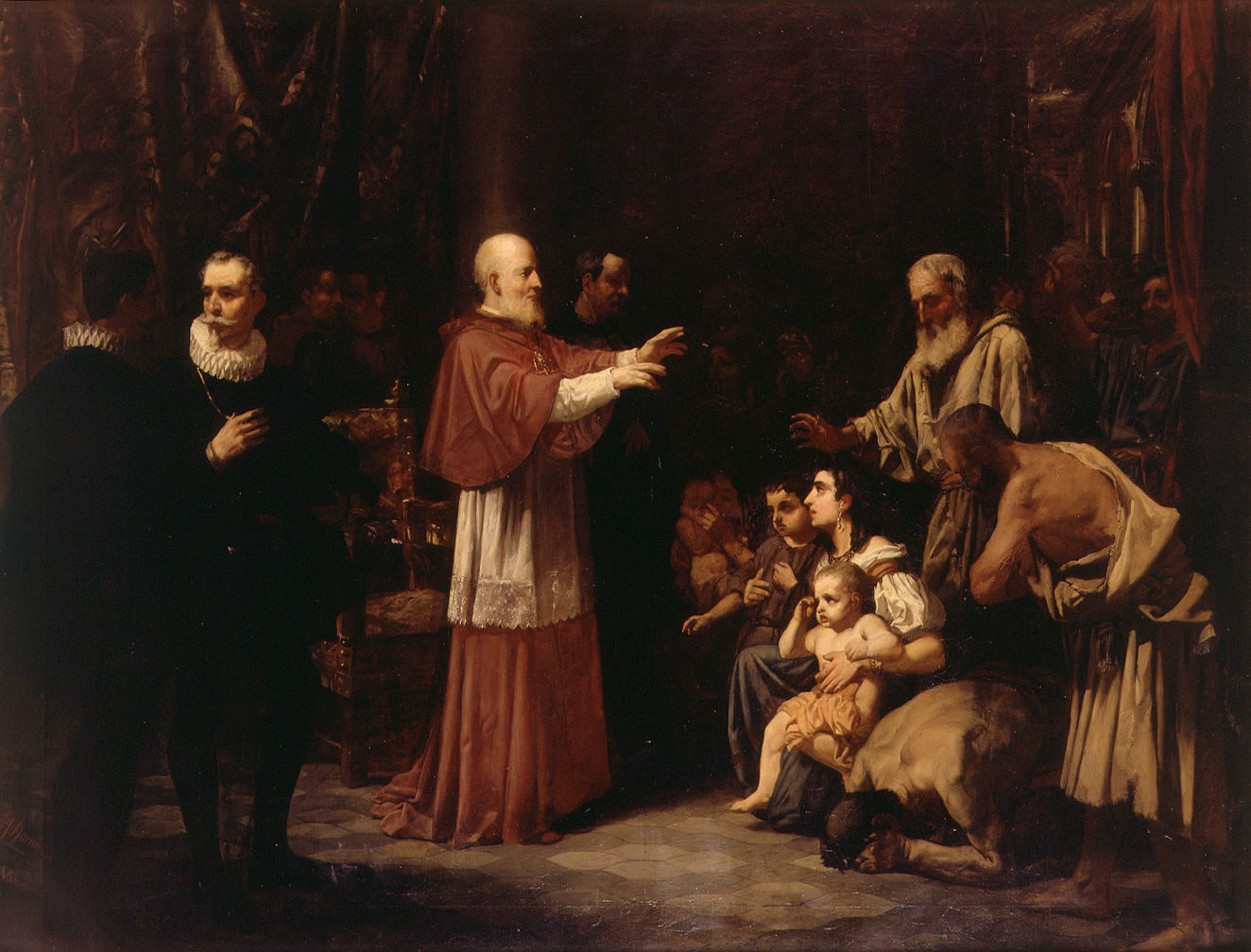 La obra representa al prelado español San Juan de Ribera (1532-1611), interviniendo en la expulsión de los moriscos, que fueron expulsados de España en 1609, durante el reinado de Felipe III de España.